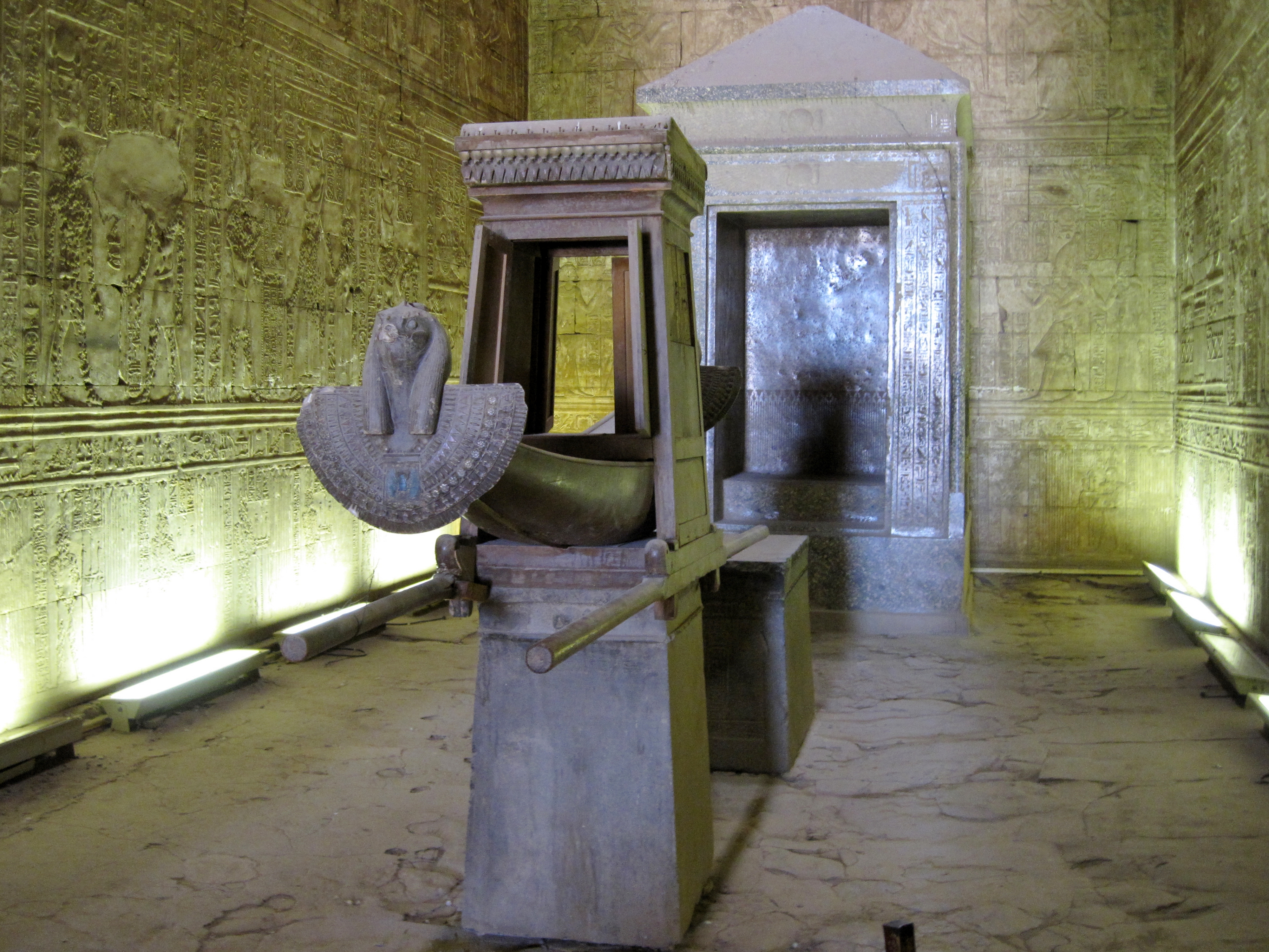 Heiligtum im Tempel von Edfu, Ägypten